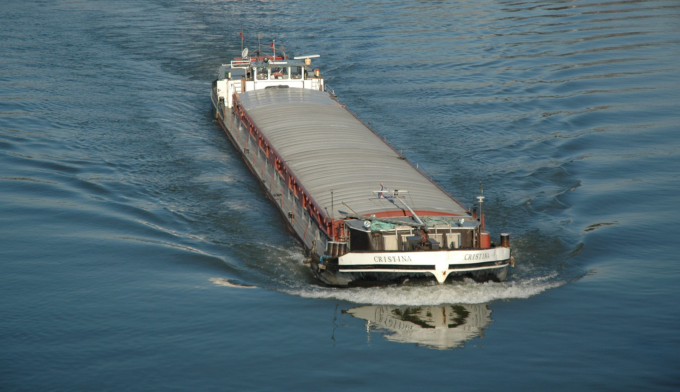 Massengutfrachter auf der Donau in Linz